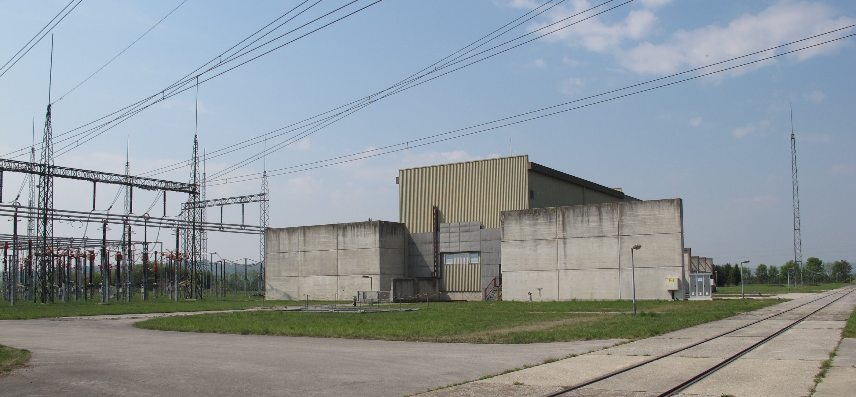 Umspannwerk Dürnrohr; Konverterhalle der ehemaligen GKK Dürnrohr. 2011 als Lager/Werkstatt genutzt. Das rechts befindliche Freiluftschaltfeld ist demontiert, die 380-kV-Leitungen von Slavětice (Tschechien) führen an der Halle vorbei direkt in das links befindliche 380-kV-Schaltfeld. Zwischen den beiden Betonwänden ausserhalb der Halle befand sich die ölgekühlte Glättungsdrossel des Gleichstromkreises – an der Schmalseite der Hallenwand sind noch die beiden Kabeldurchführungen (Quadratische Ausnehmungen) zum Anschluss erkennbar. Hinter den Betonwänden an den beiden Längsseiten der Halle im Aussenbereich in Buchten befanden sich die Leistungstransformatoren.